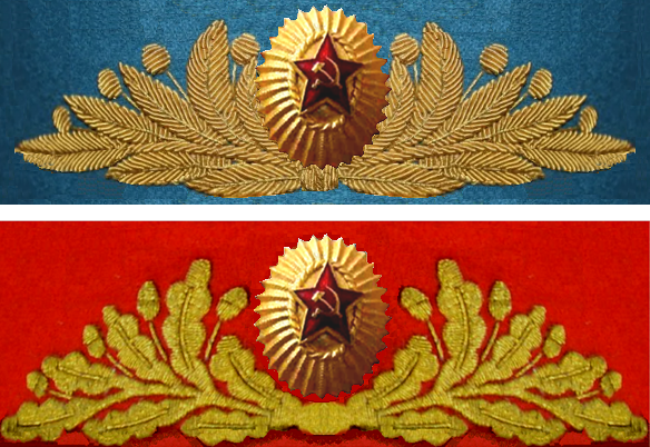 Фуражка 69пв1